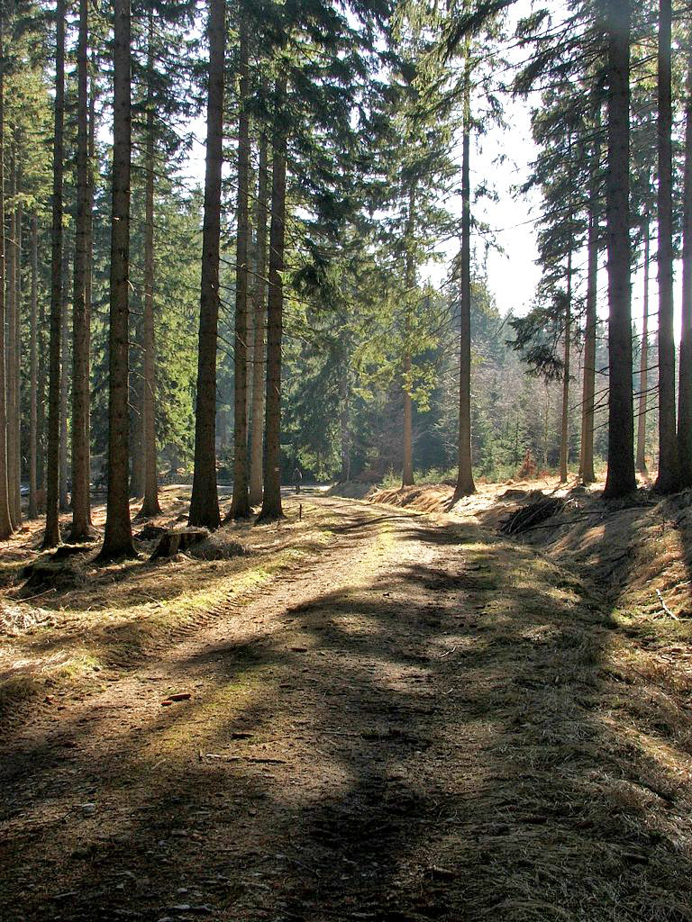 Przełęcz Staromorawska i Droga Staromorawska w Masywie Śnieżnika (Sudety Wschodnie, Polska). Widoczne skrzyżowanie dróg na przełęczy i turystyczny drogowskaz.